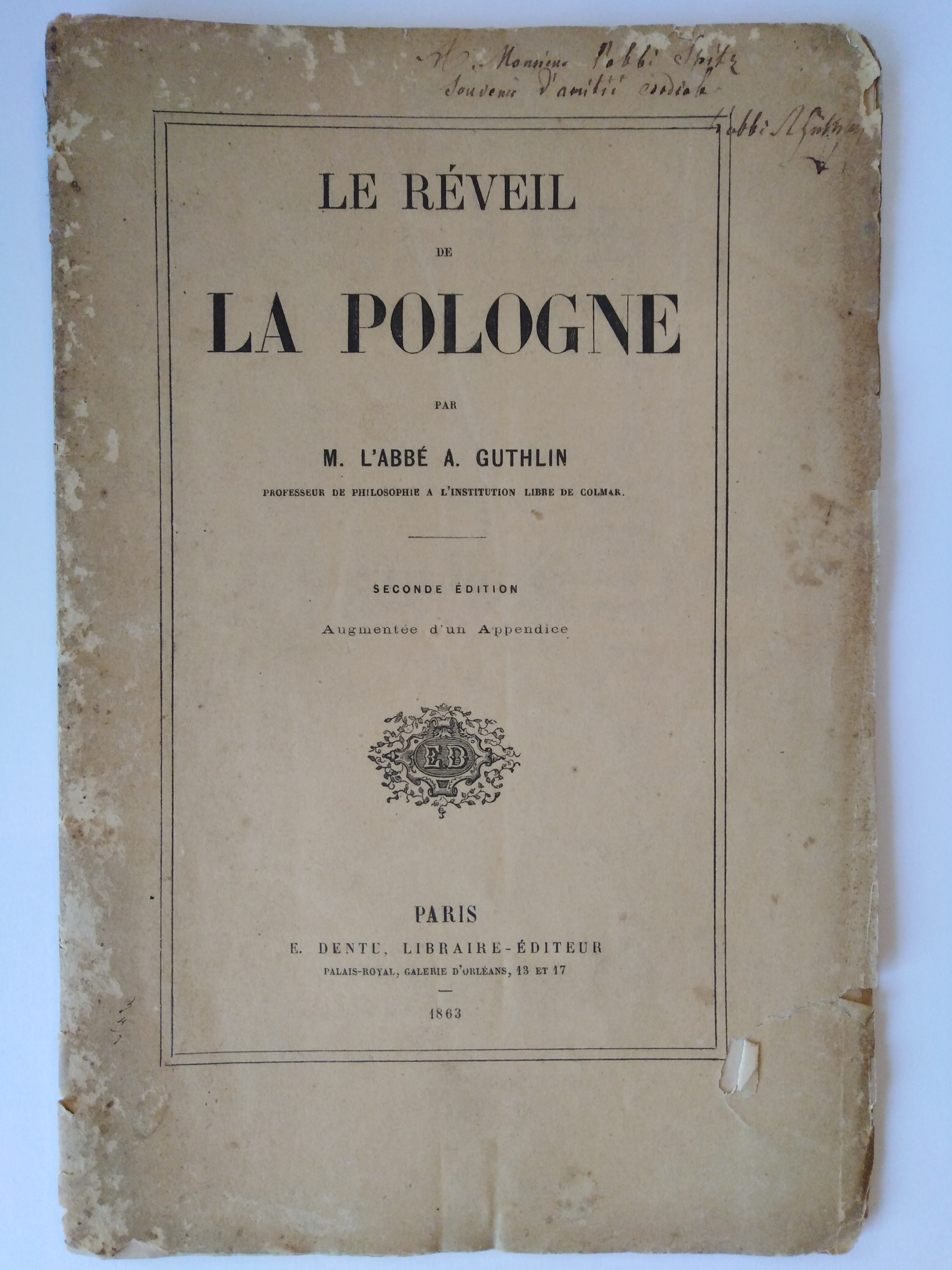 Le Réveil de la Pologne de 1863 par Aloise Guthlin